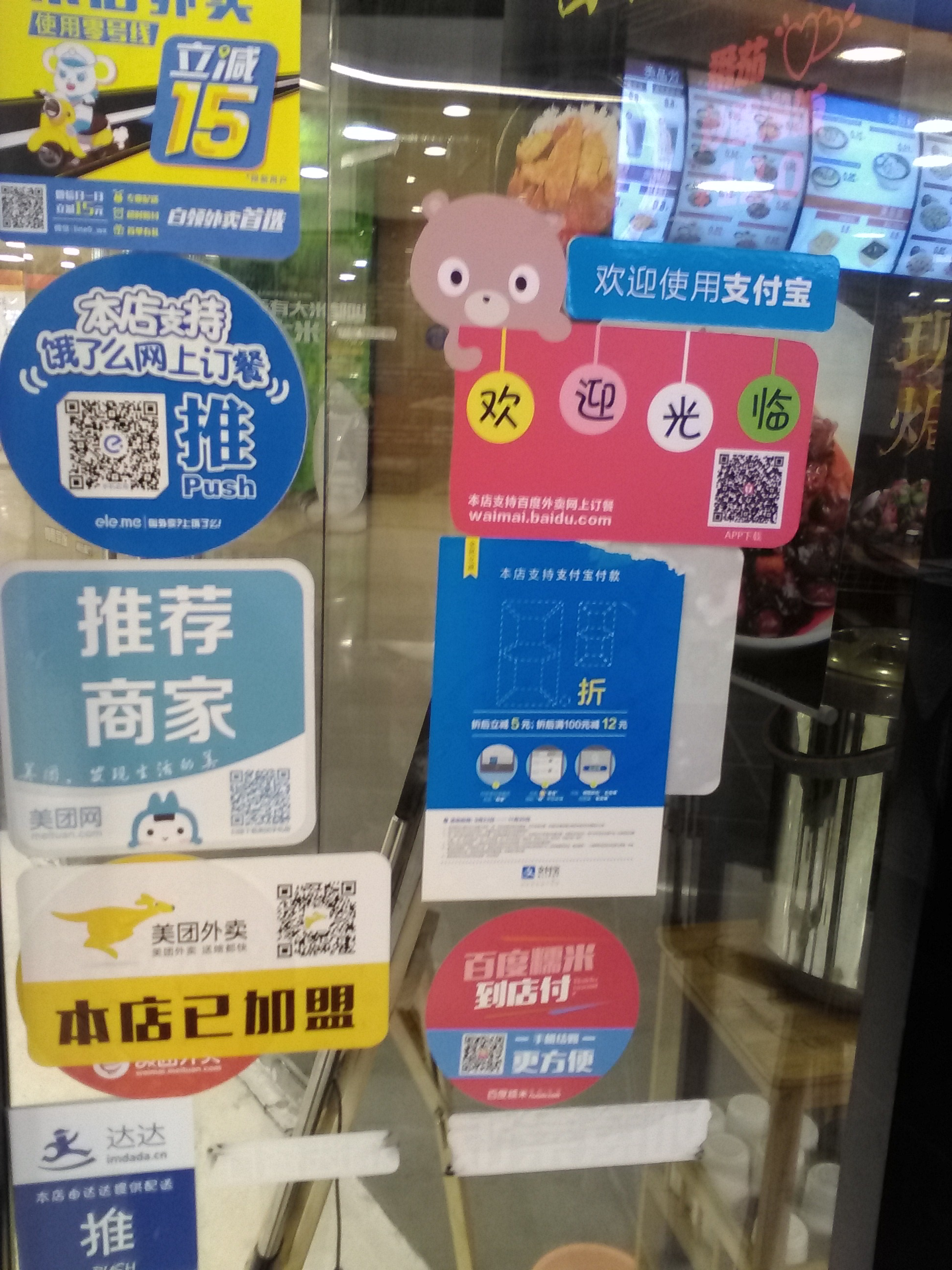 中文（中国大陆）: 苏州如意菜饭一家门店粘贴的各大外卖公司标识，以及zh:支付宝标识。